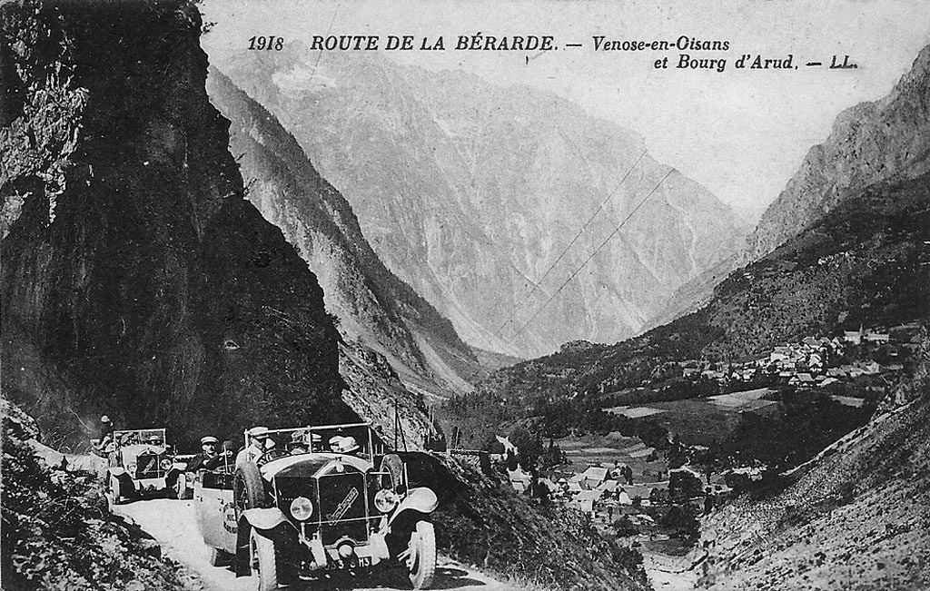 Route de la Berarde. Vénosc et Bourg d'Araud, Isère, France. Carte postale ancienne